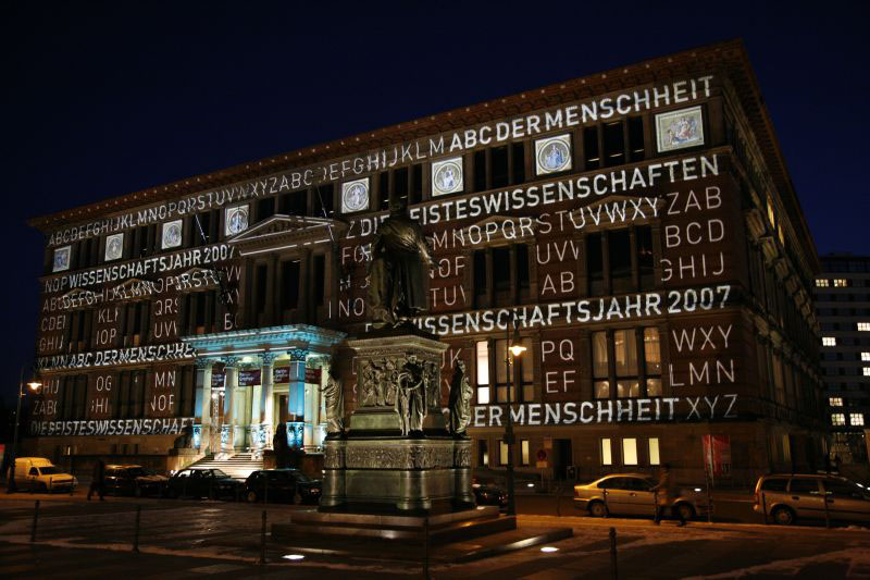 Auftakt im Berliner Martin-Gropius-Bau 25. Januar 2007